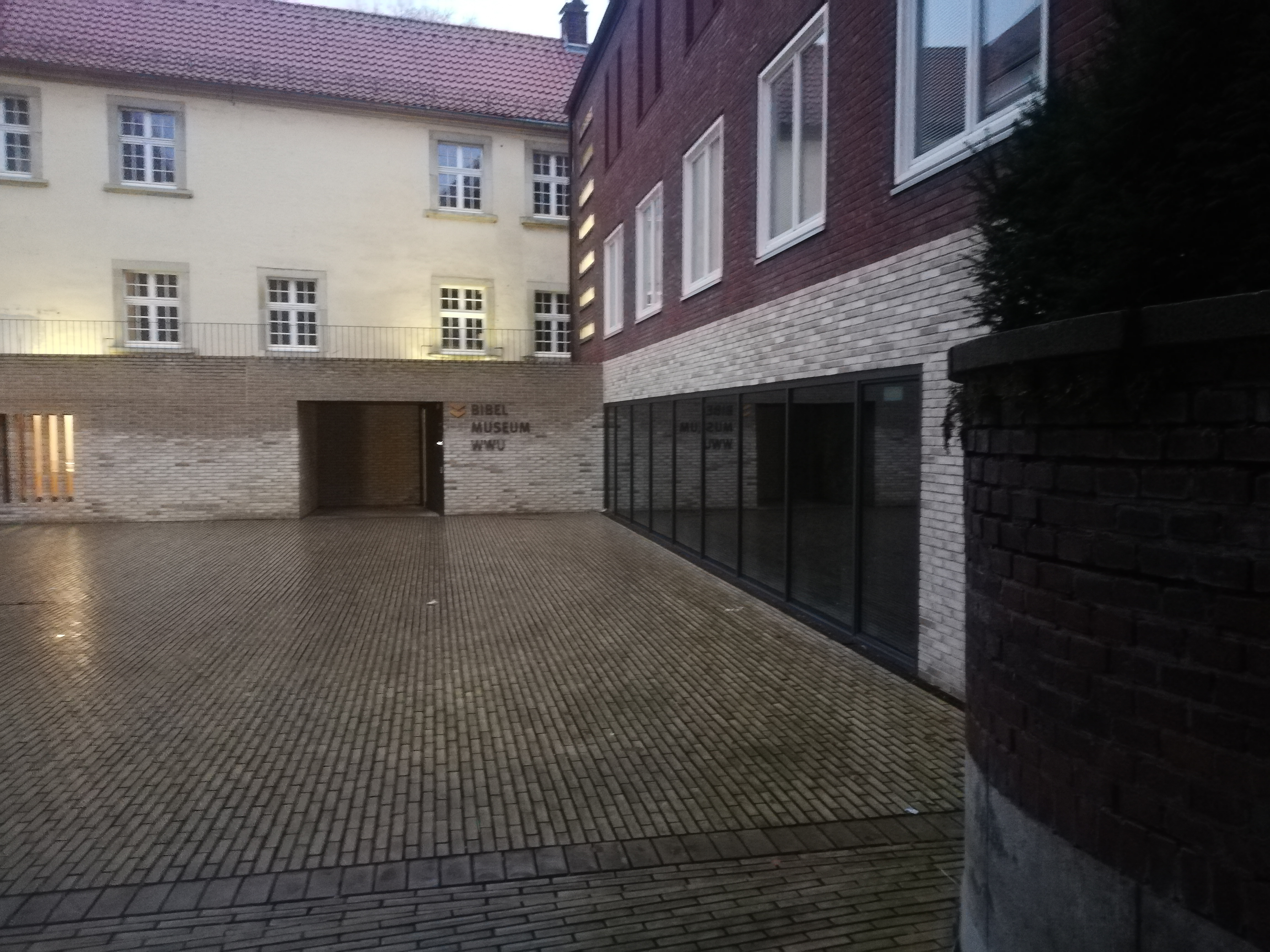 Eingang zum Bibelmuseum Münster nach dem Umbau